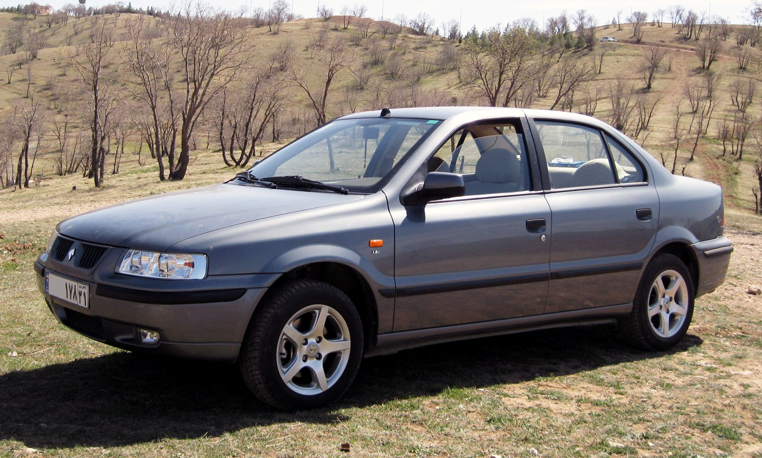 Samand LX